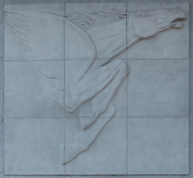 Cheval ailé oeuvre de Oscar de Clerck